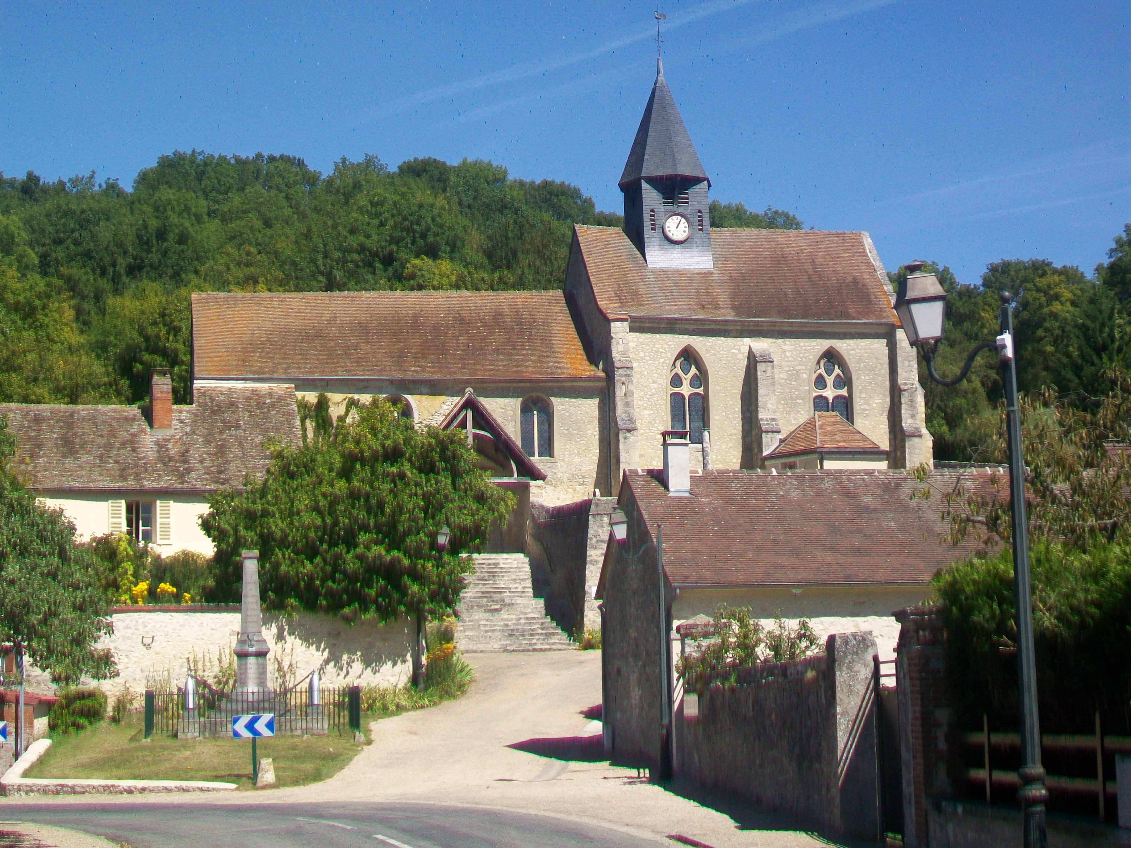 Vue sur l'église depuis le village ; façade sud.